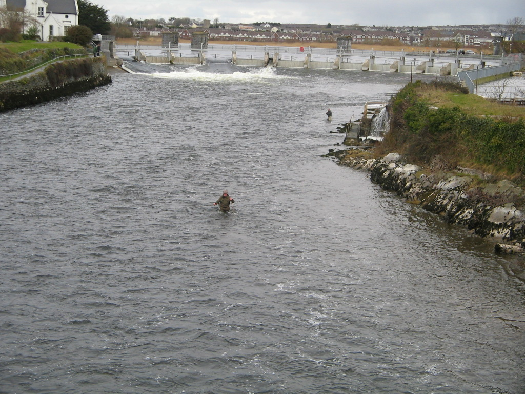 Photo prise en Mai 2006, depuis le Salmon Weir Bridge, a Galway. Je certifie etre l'auteur de cette photo (appareil photo utilise: Canon PowerShot A400) Gronico 11:11, 15 August 2006 (UTC)